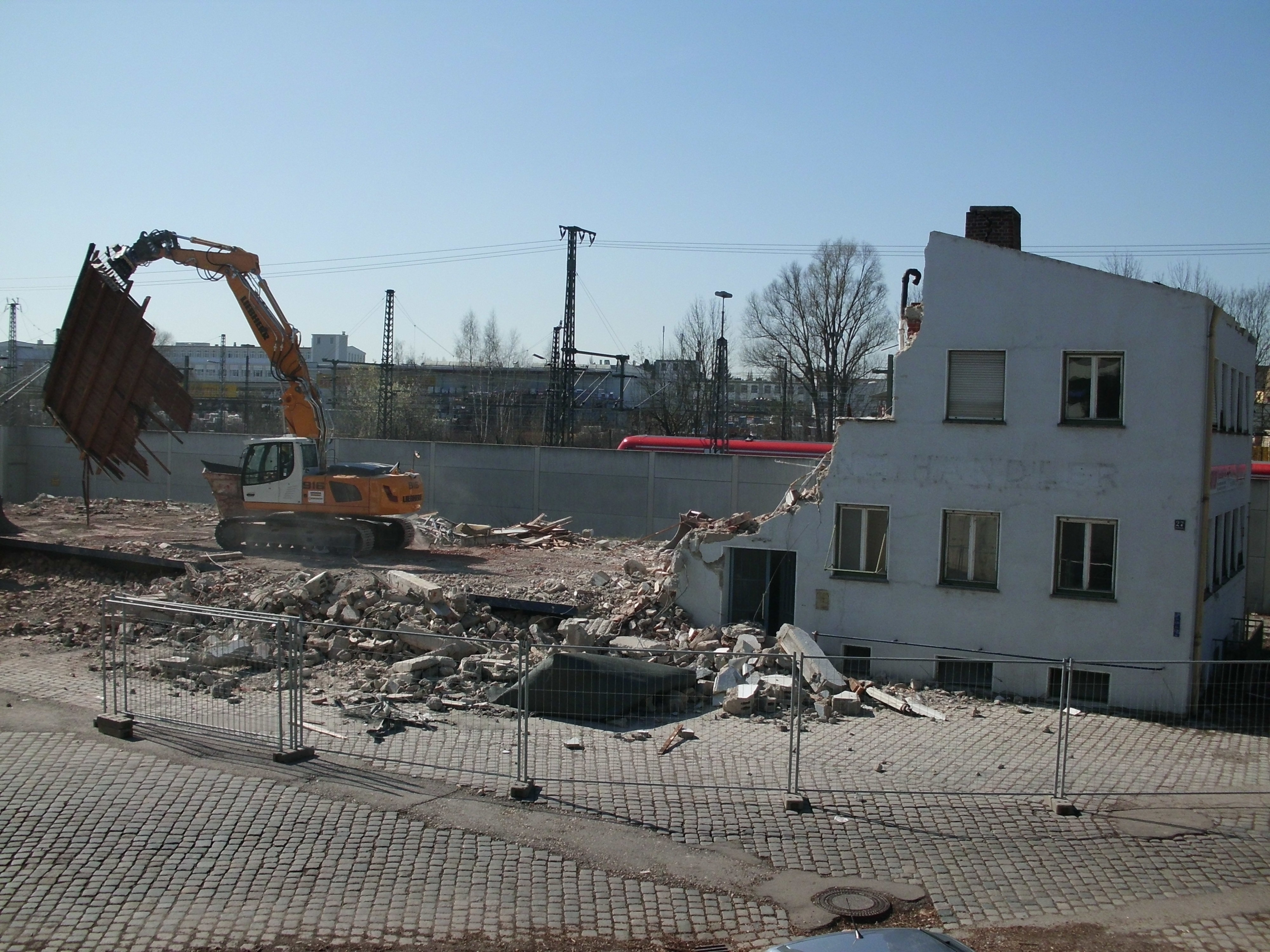 Abbruch eines Ladehofgebäudes in Augsburg.